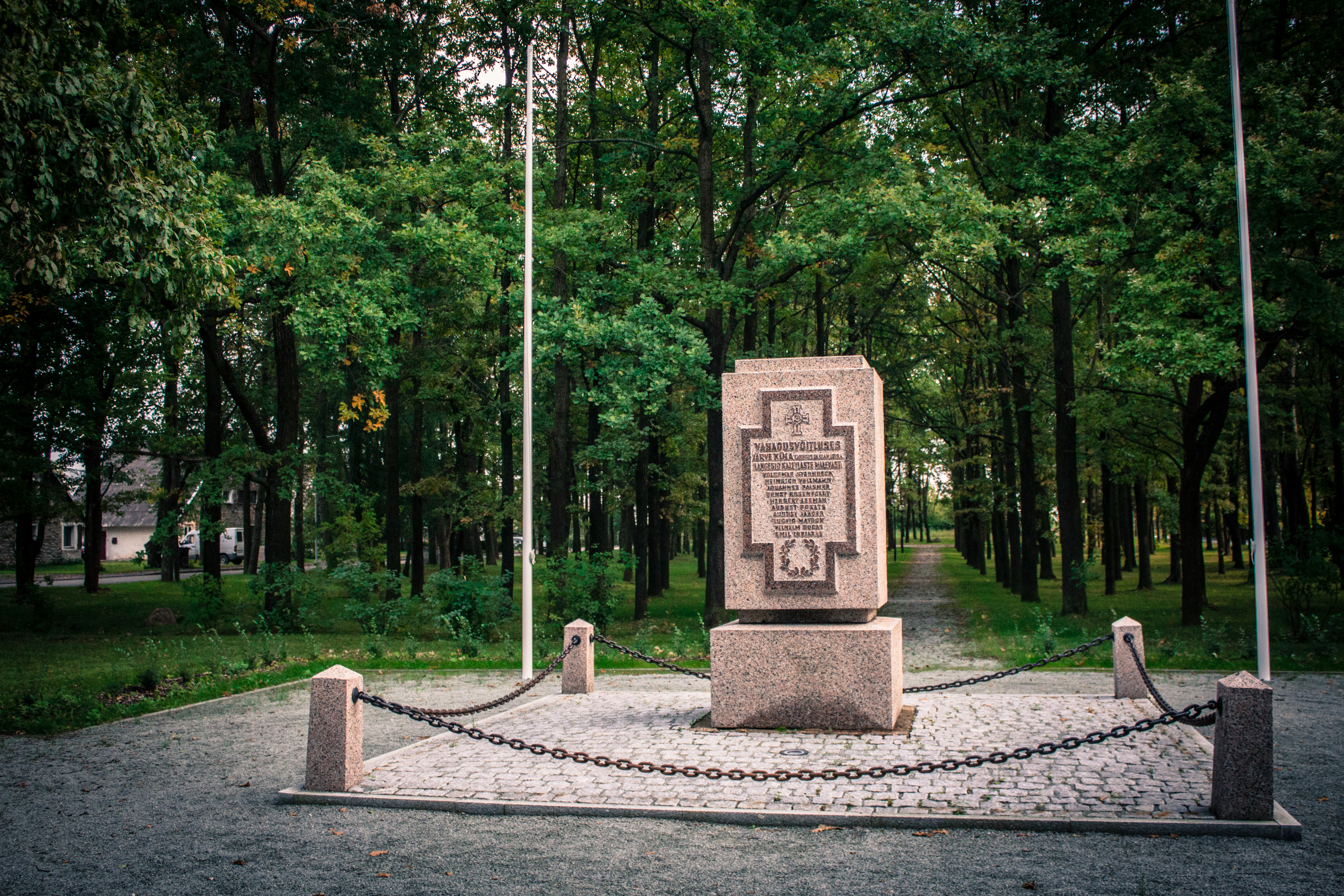 Vabadussõja Järve lahingu mälestussammas